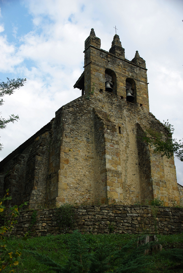 Église Saint-Jean-Baptiste : existait en 1630 ; restaurée à la fin du 17e. Mur-clocher restauré vers 1980 .